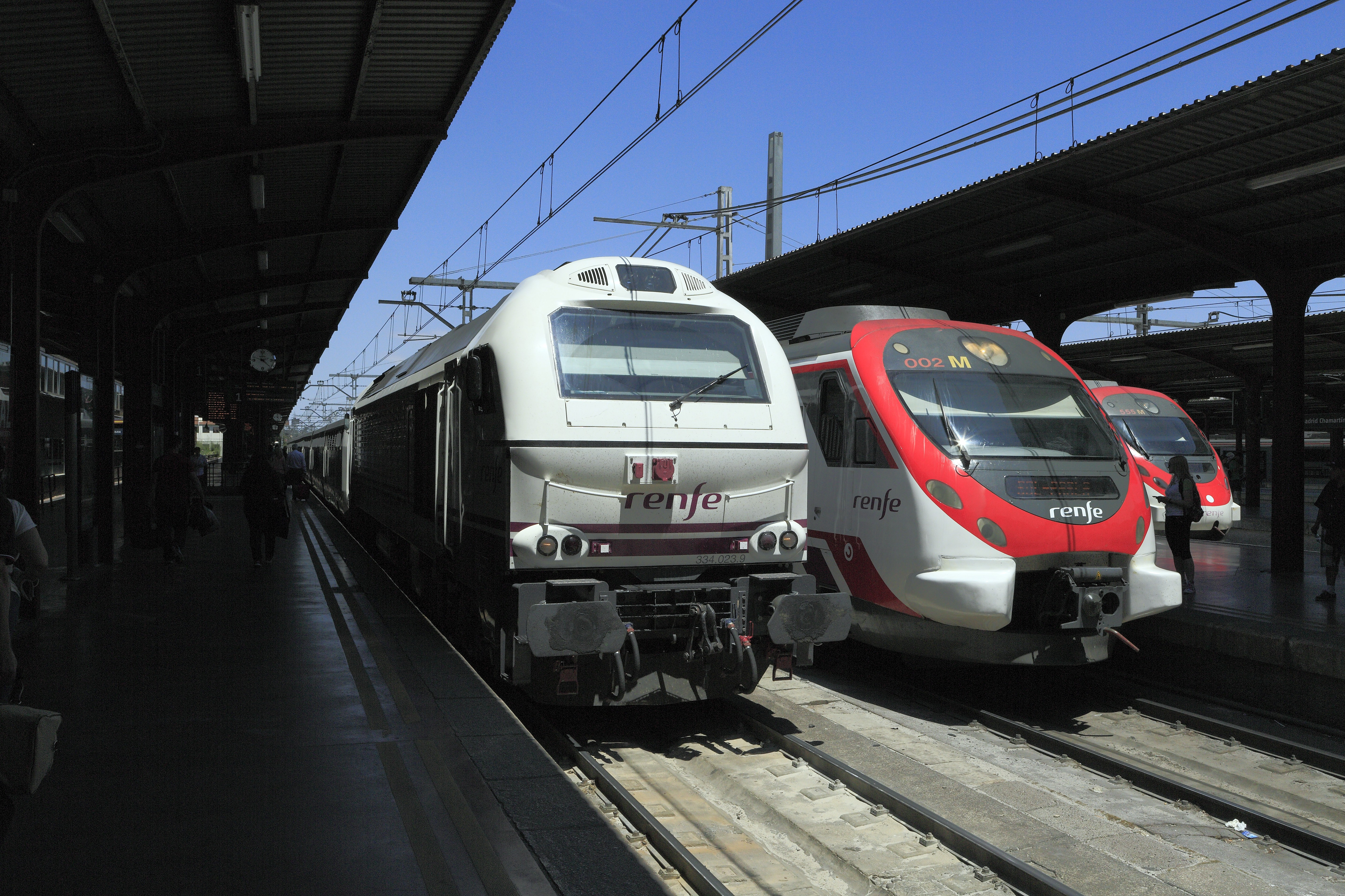 Gleise 1 und 2, links durchgehend mit Diesel bespannt der Talgo 260 Madrid Chamartín–Alicante, rechts ein S-Bahn-Zug. Auffällig ist das völlige Fehlen von Personenkontrollen- und Gepäckkontrollen bei den Breitspurfernzügen. Man kommt sich vor wie in Mitteleuropa.